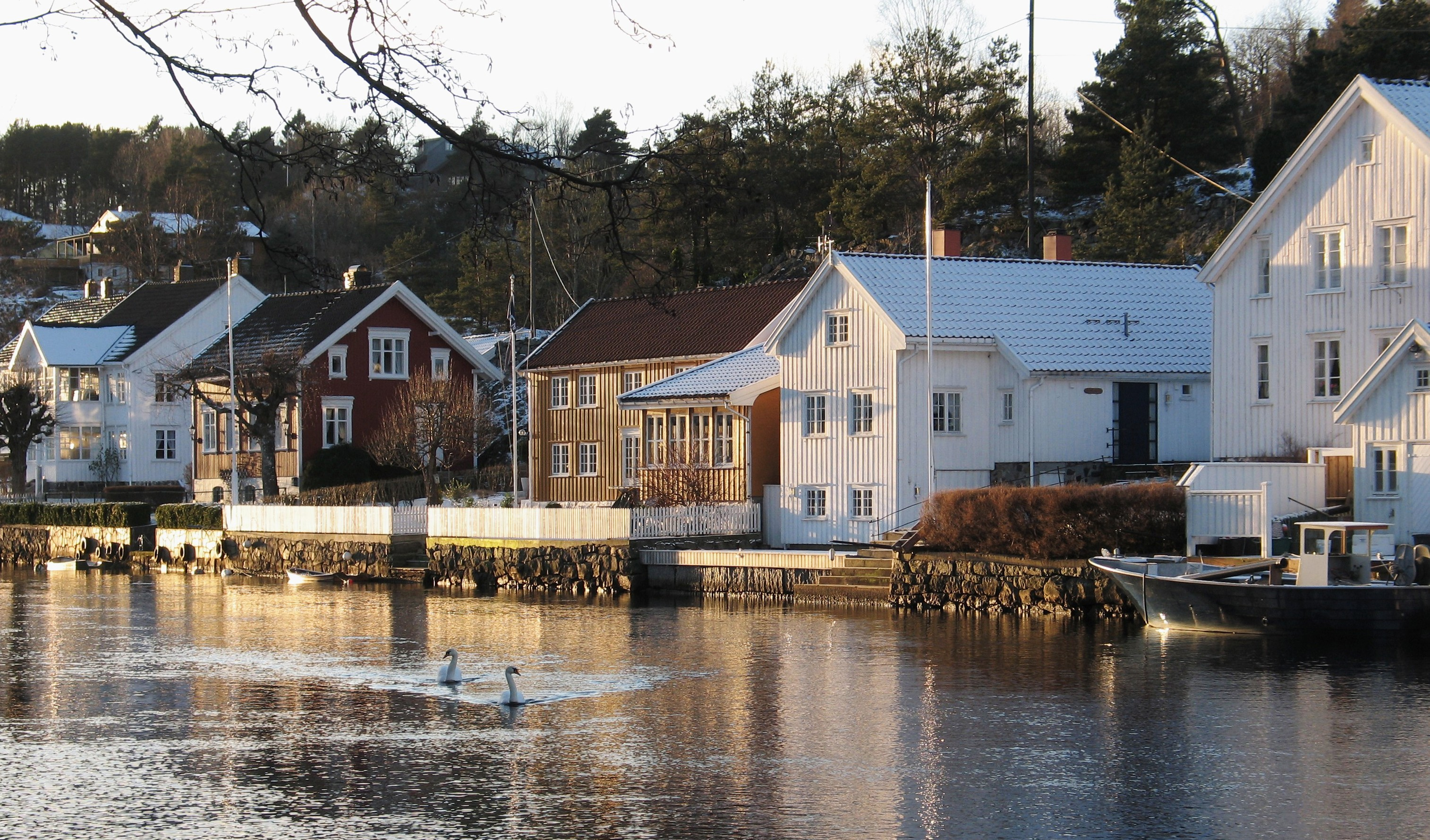 Vrengen, bebyggelse ved bredden av Nidelva i Arendal